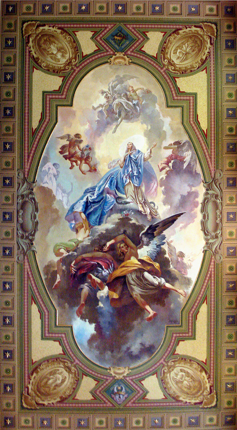 Ascensão de Nossa Senhora, Catedral de Santa Maria, Brasil. Obra de Aldo Locatelli na década de 50-60.